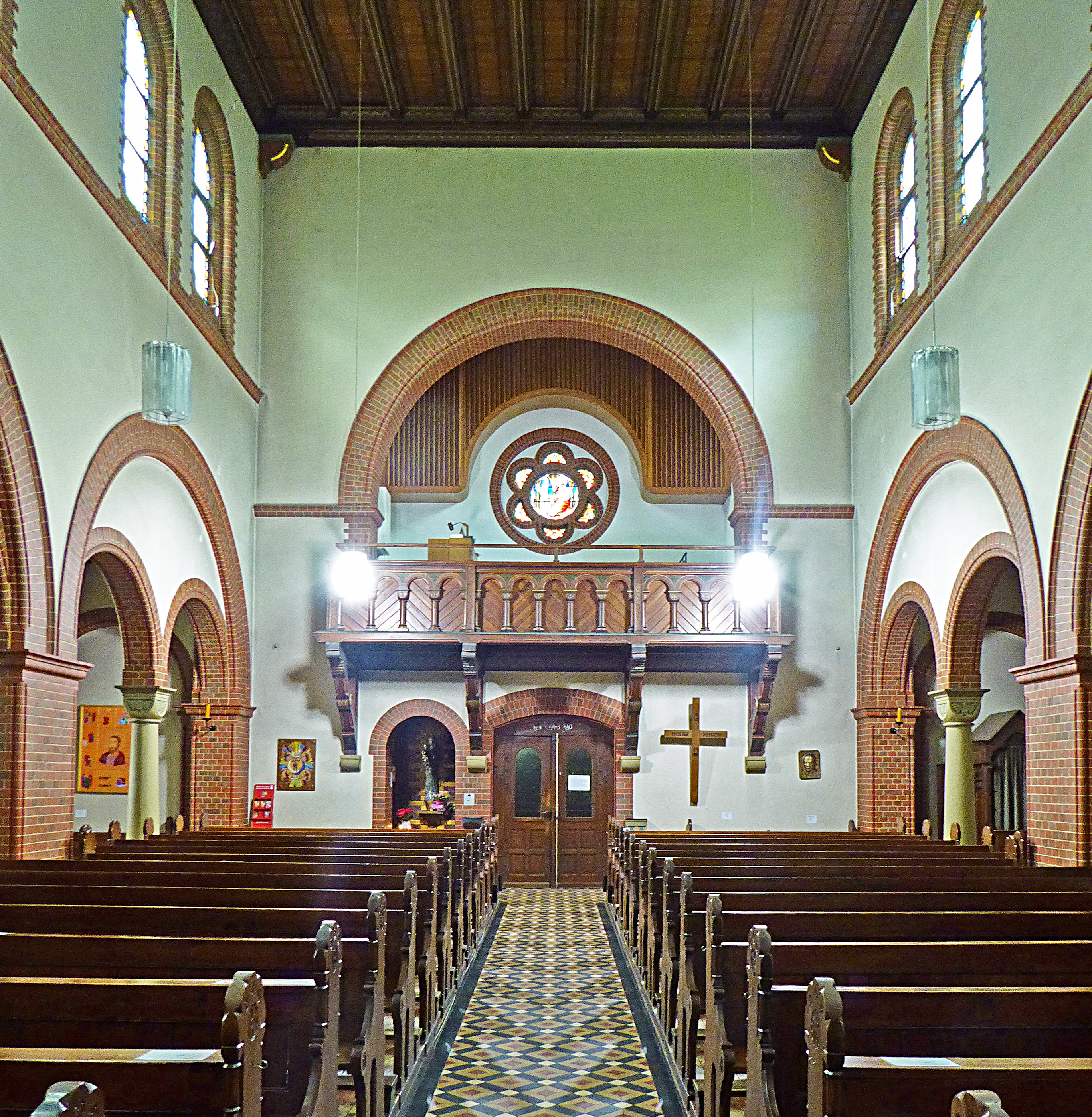 Blick zur Orgelempore in der Pfarrkirche St. Josef (Einbeck)